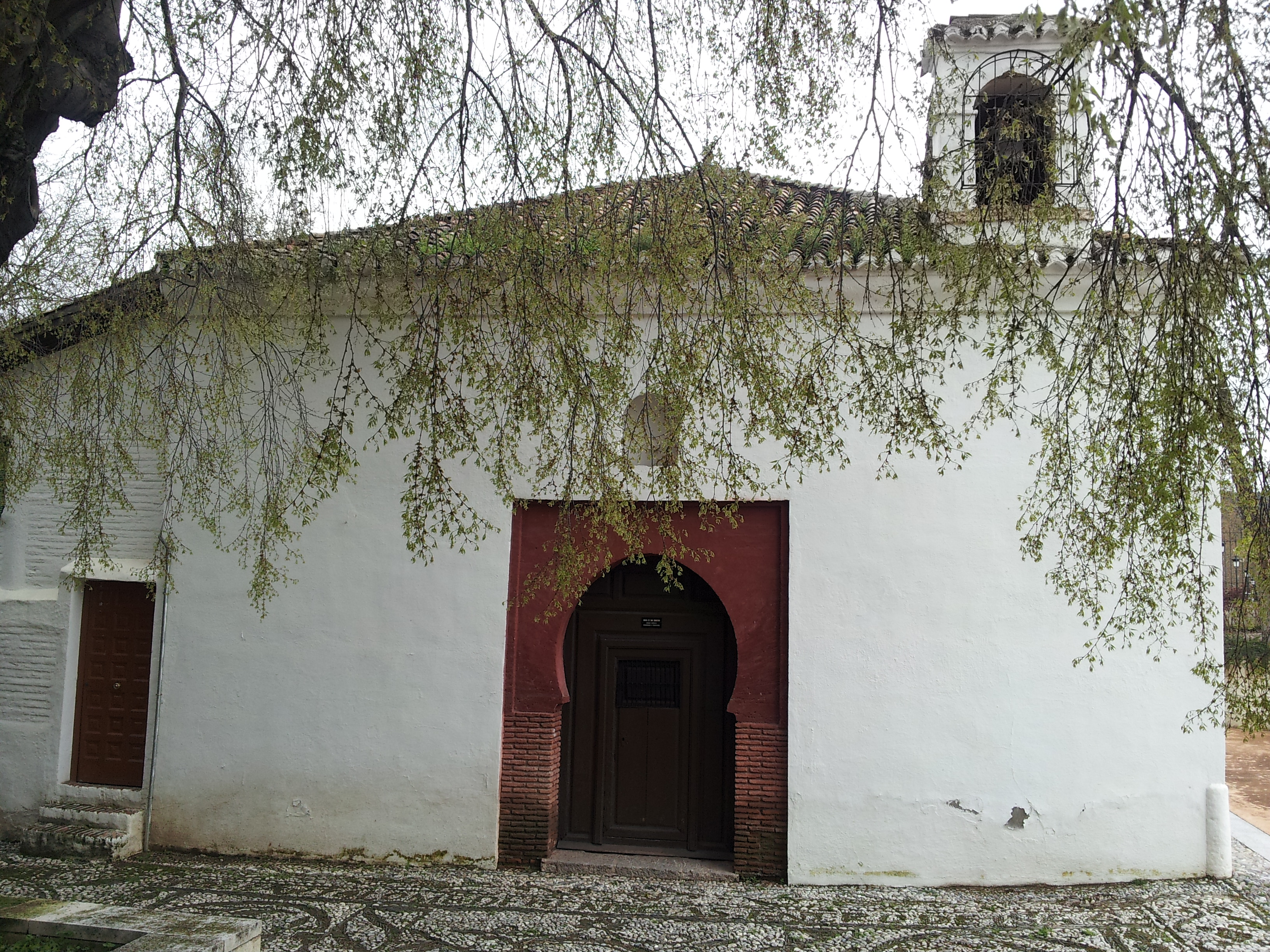 Ermita de San Sebastián y Fabián en Granada